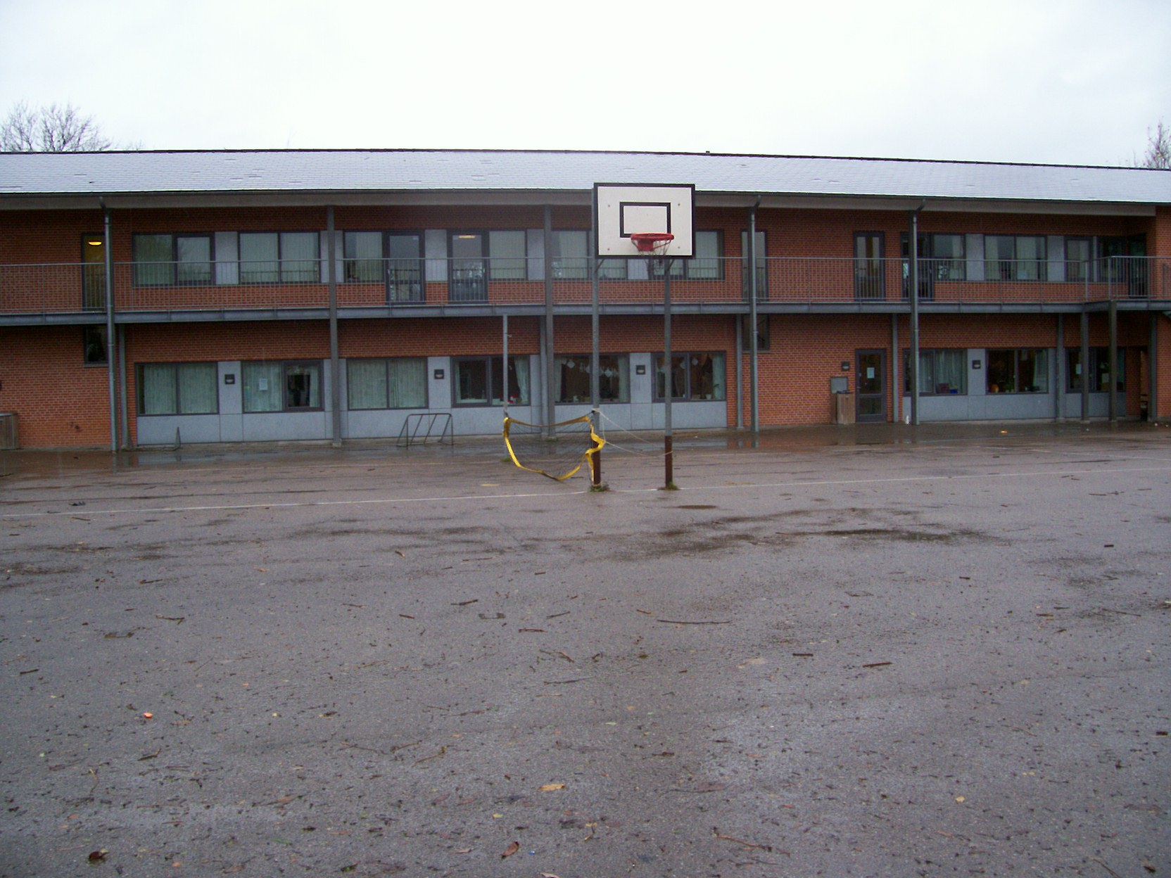 Højelse Skoles tilbygning fra 2003.